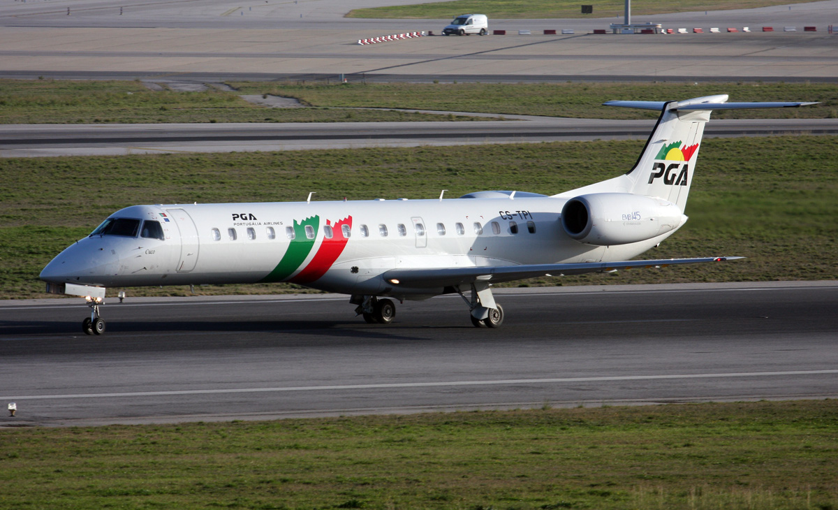 Lisbon 08 December 2007